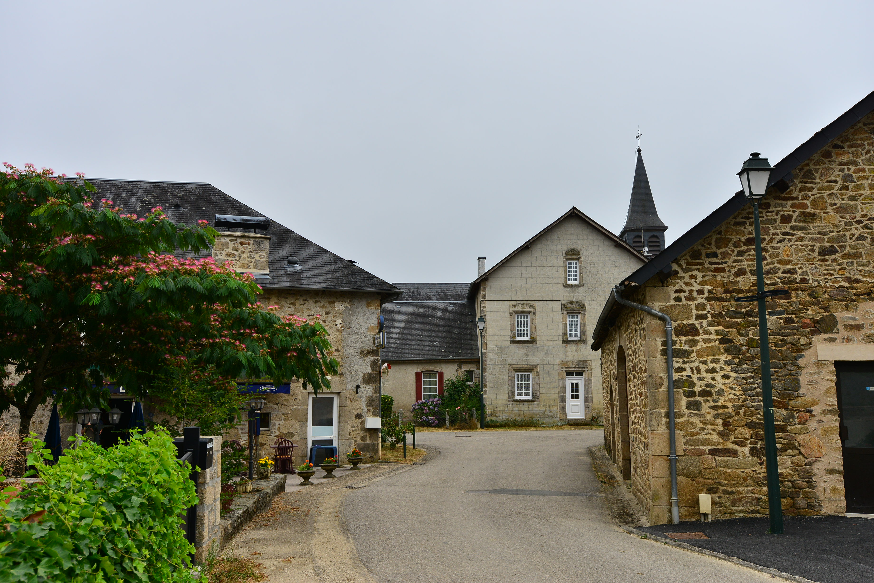 Orliac de Bar, Corrèze, France, Le centre du village